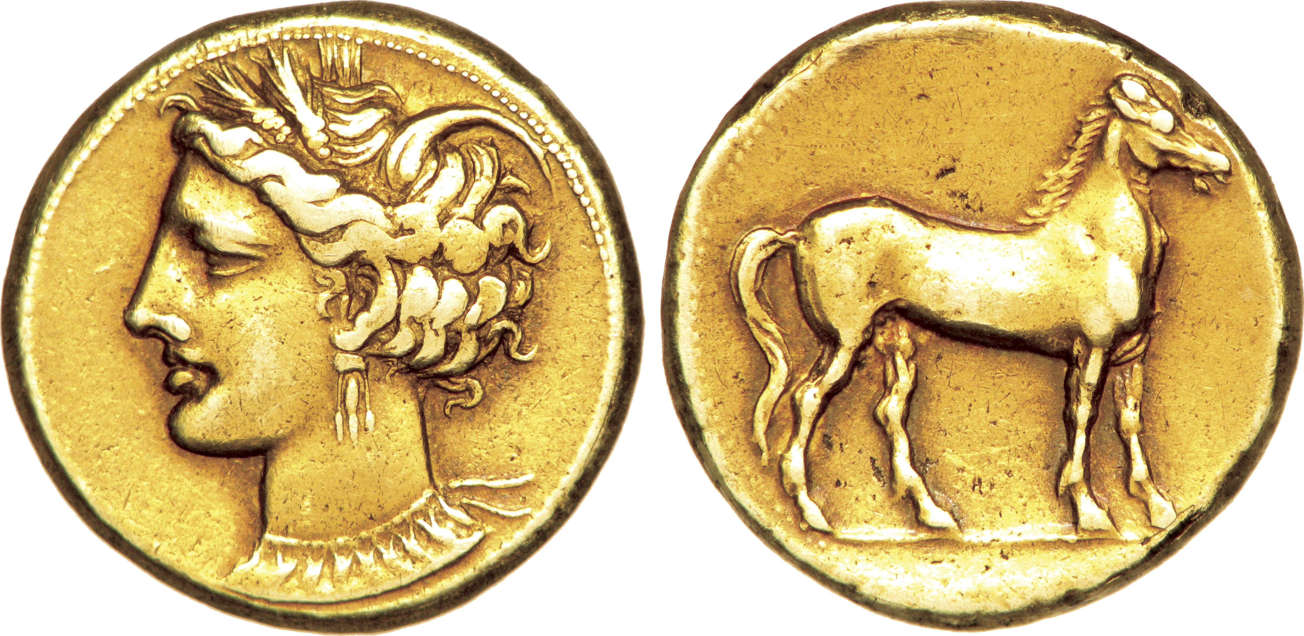 Nom de l'atelier : Zeugitane, Carthage Métal : électrum Diamètre : 18,5mm Axe des coins : 12h. Poids : 7,45g. Titulature avers : Anépigraphe. Description avers : Tête de Tanit à gauche, couronnée d’épis, parée d’un collier et d’un triple pendentif d’oreilles. Titulature revers : Anépigraphe. Description revers : Cheval debout à droite ; deux globules sous la ligne d’exergue.